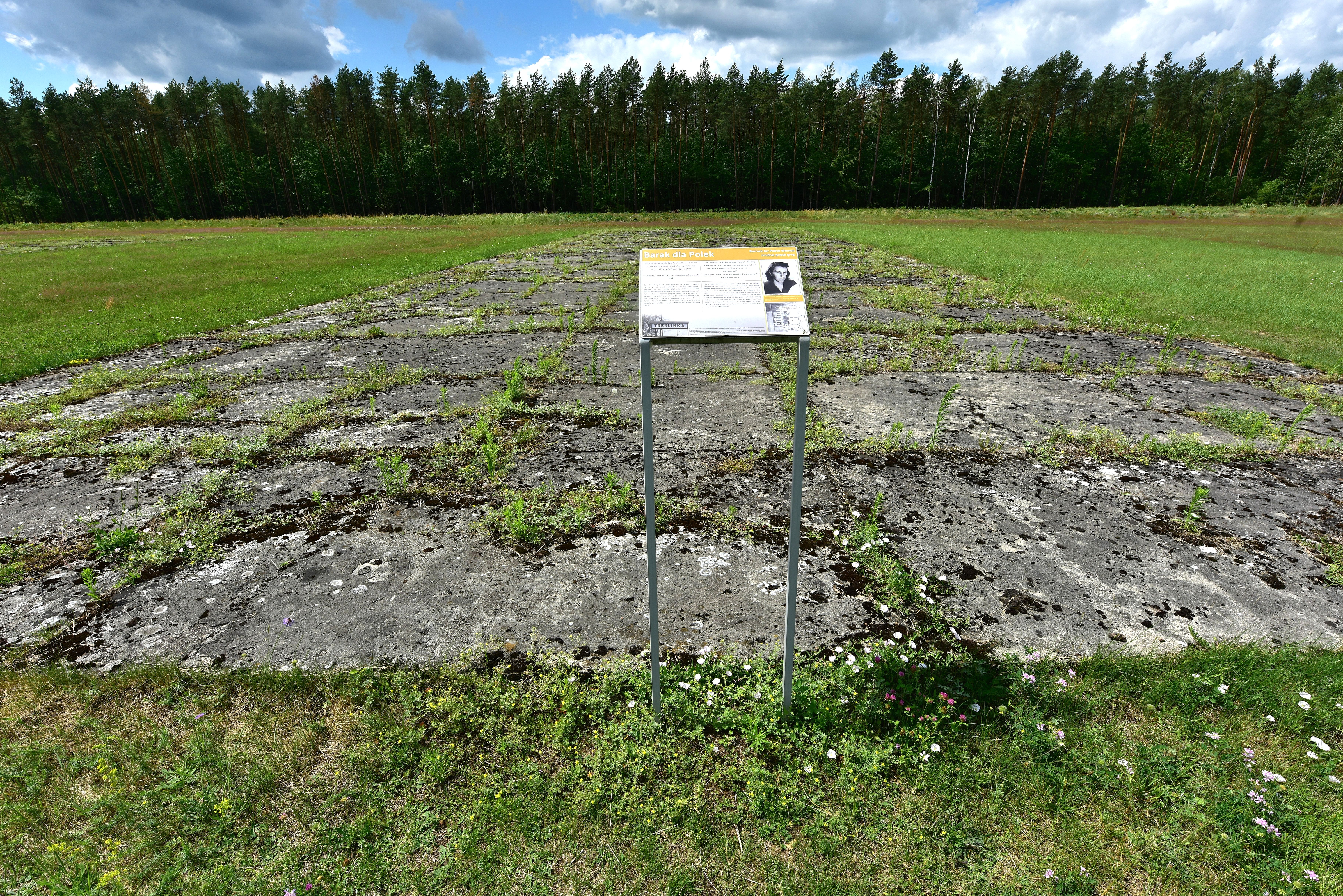 Karny obóz pracy w Treblince. Barak dla Polek